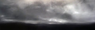 Category:Kwang Sung Park